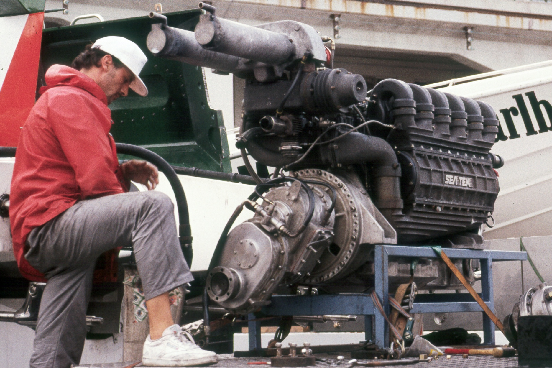 6-Zyl. Seatek-Dieselmotor aus einem Offshore-Rennboot